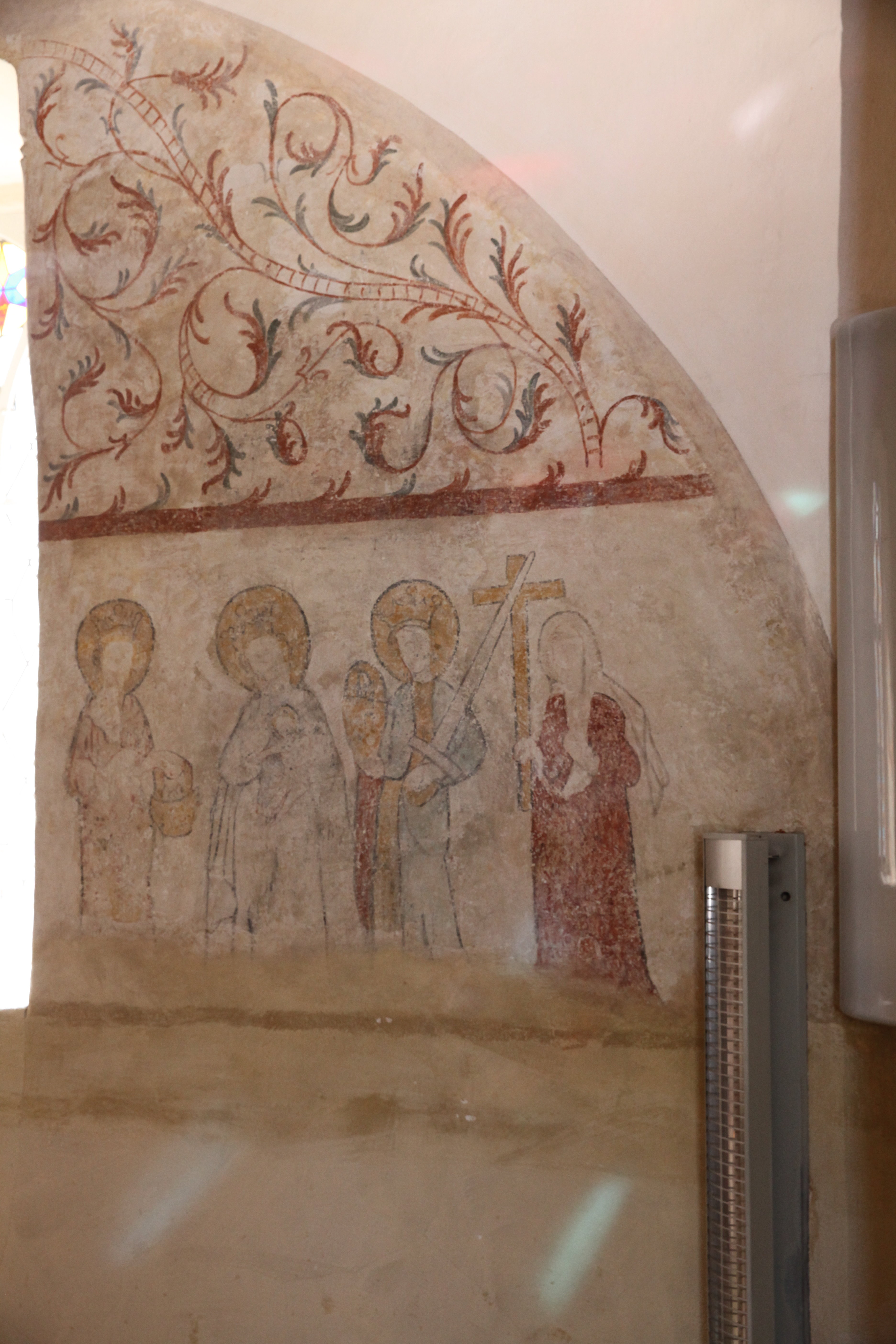 Fresko, Evangelische Marienkirche in Watzendorf